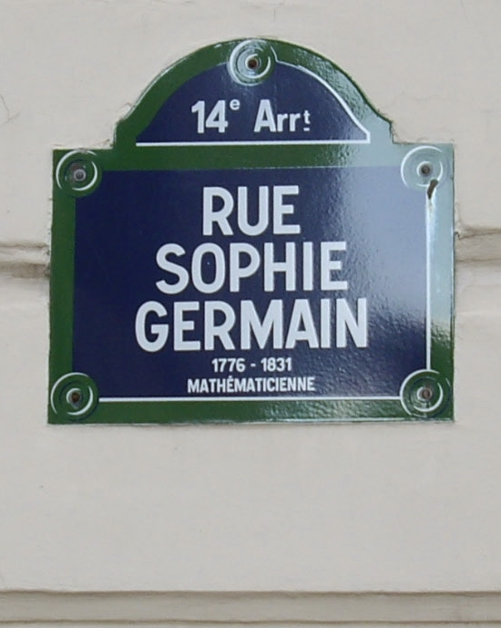 Plaque de la rue Sophie-Germain, Paris 14e, en mémoire de la mathématicienne Sophie Germain (1776-1831)